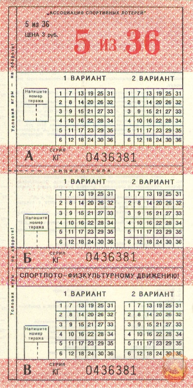 Бланк государственной лотереи СССР "Спортлото".